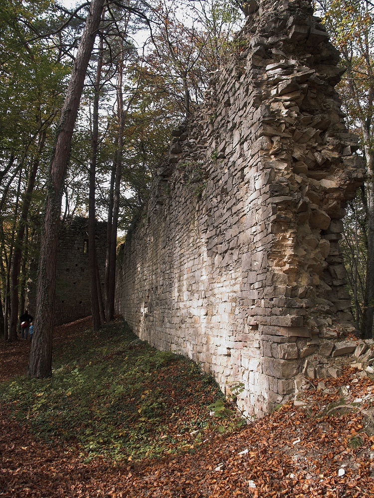 Pallasreste der Tudoburg, Eigeltingen, Germany